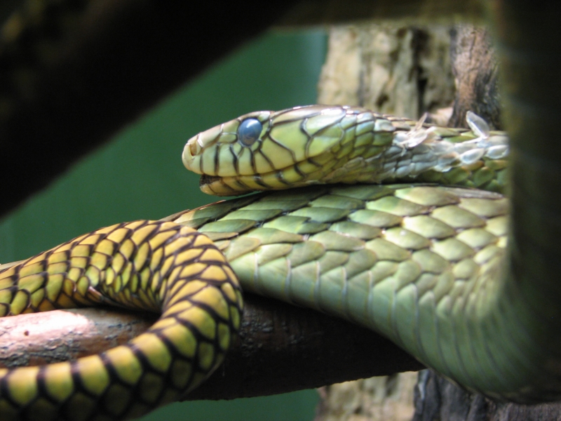 Western Green Mamba (Dendroaspis viridis)